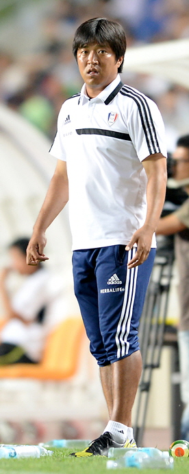 수원 블루윙즈 고종수